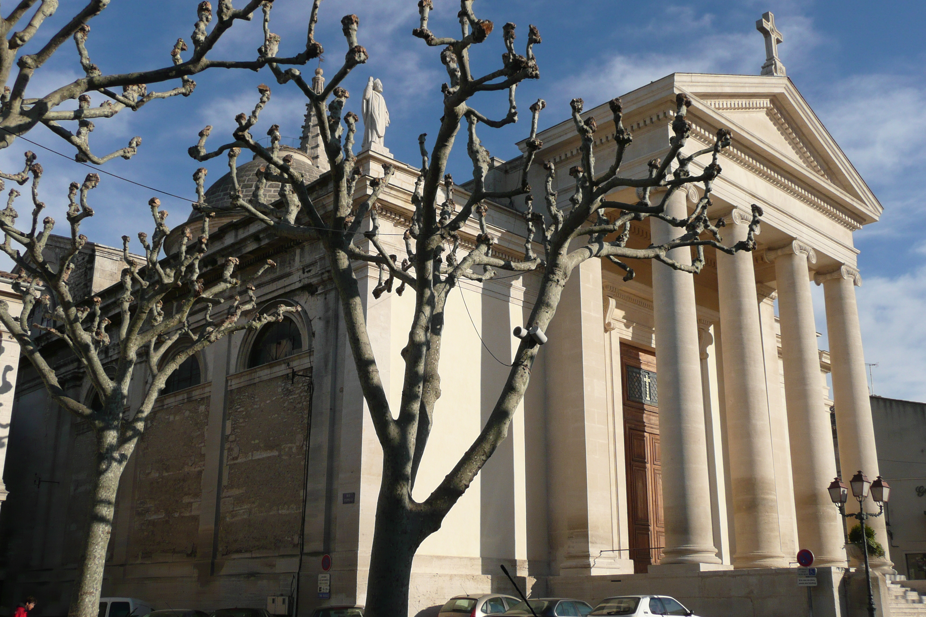 Eglise à Saint Rémy de Provence.